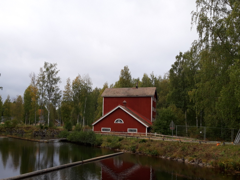 Старая мельница